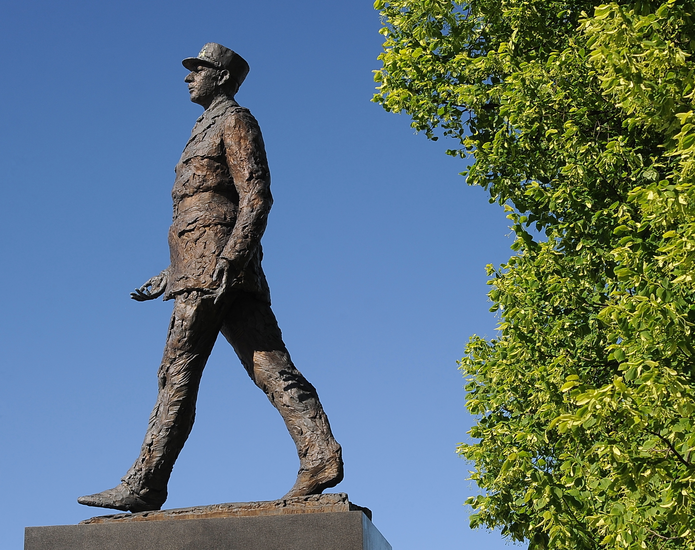 Pomnik Charles'a de Gaulle'a w Warszawie - widok z boku